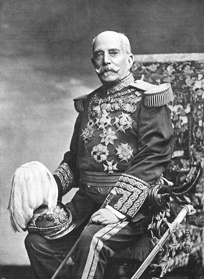 Retrato del Fernando Primo de Rivera y Sobremonte, obra del fotógrafo Kaulak, recogido en la revista española La Ilustración Española y Americana.